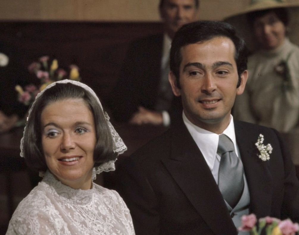 Burgelijk huwelijk Prinses Christina en Jorge Guillermo in Stadhuis in Baarn, koppen